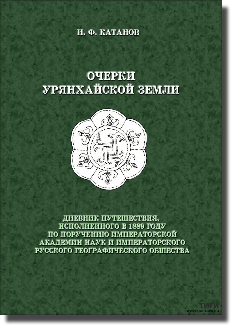 Tuva hakkında ünlü Türkbilimci Katanov'un yazdıkları